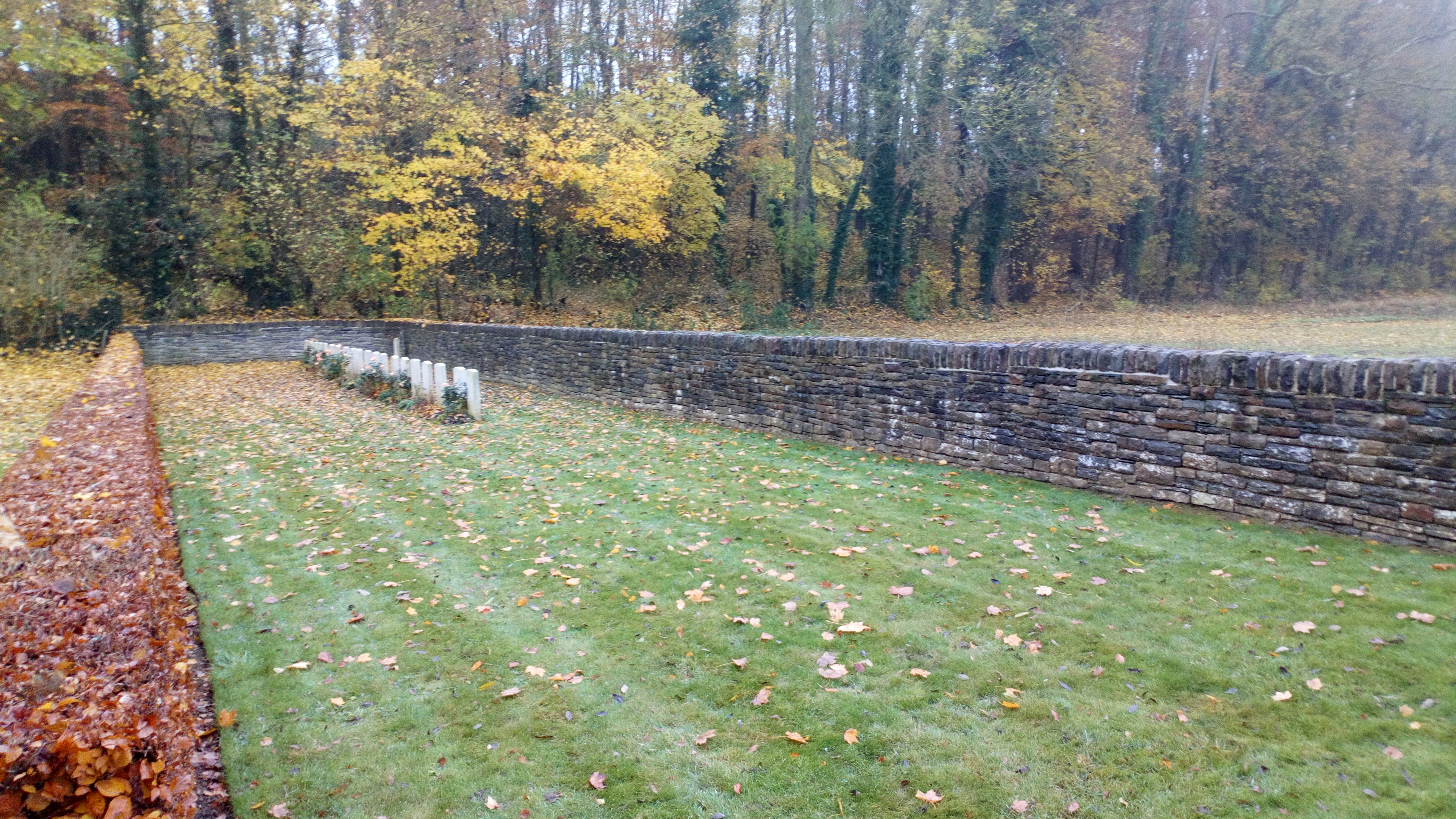 Montigny-sur-l'Hallue, cimetière militaire britannique 2